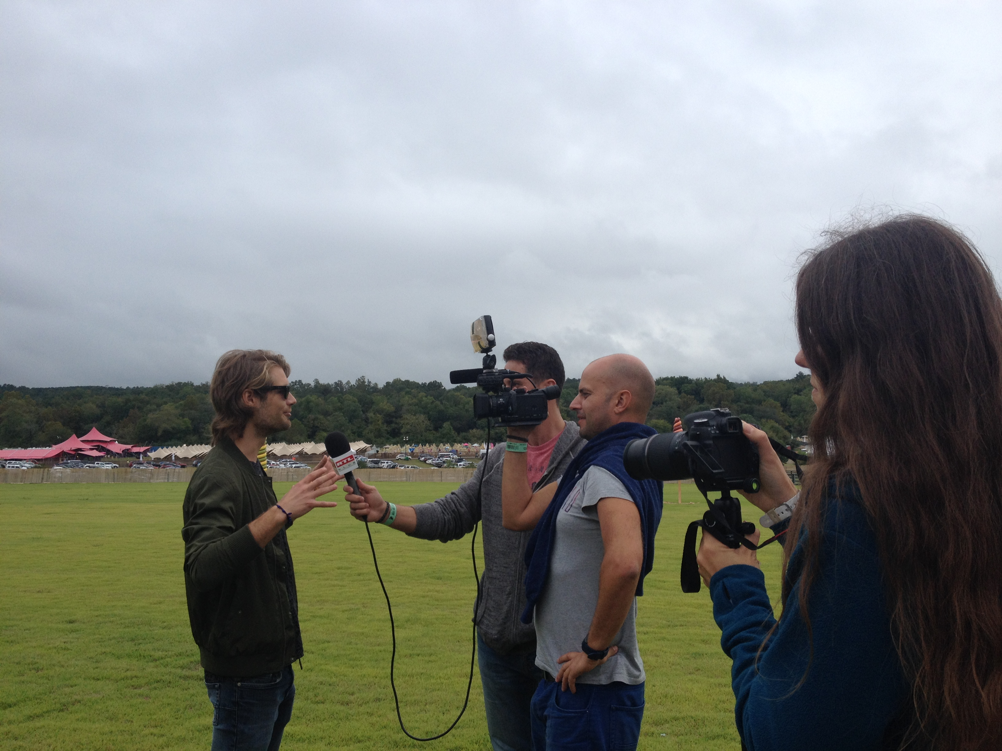 Calfan Michael Interview